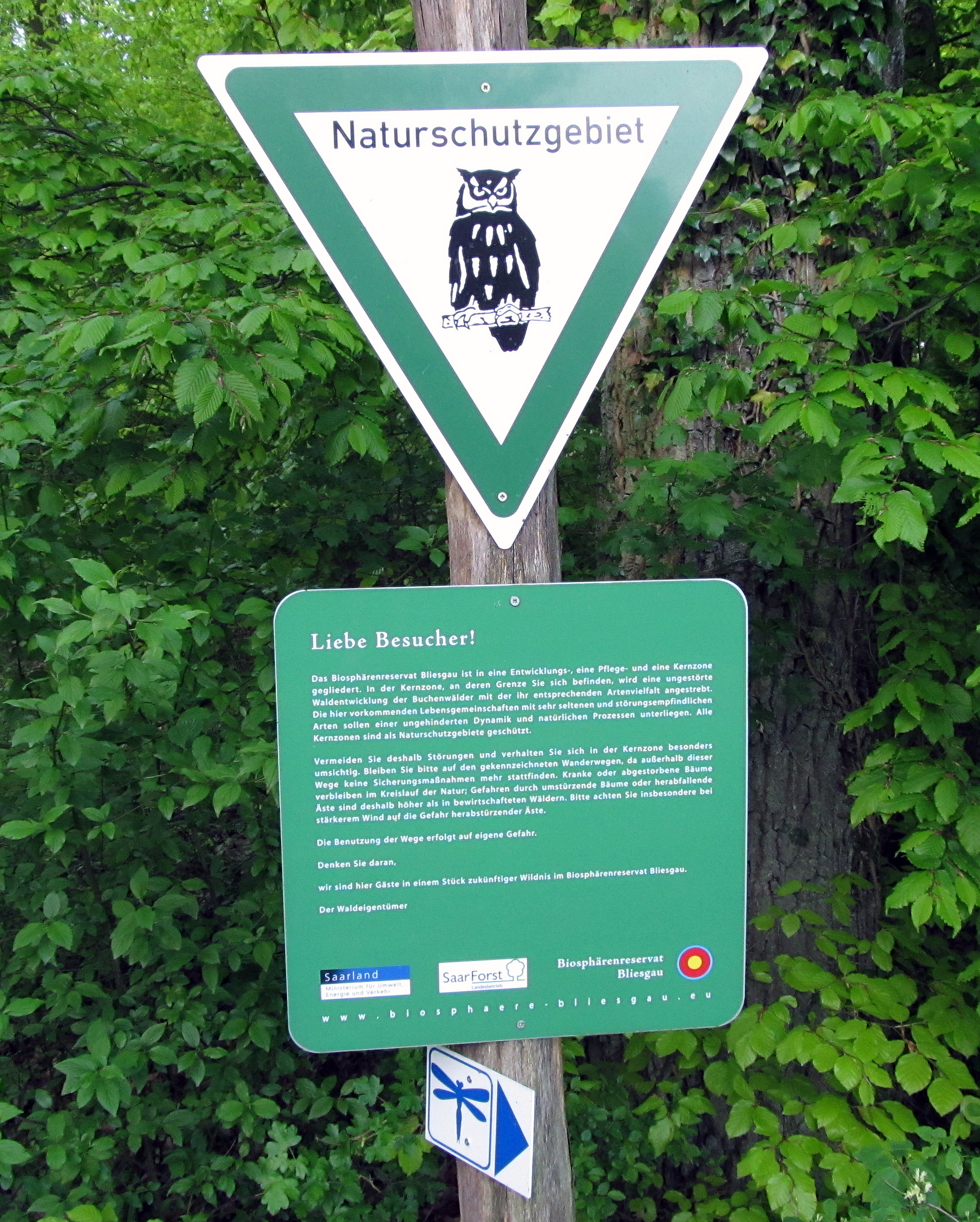 Hinweisschilder am Eingang zur Kernzone "Böckweiler Wald" im Biosphärenreservat Bliesgau